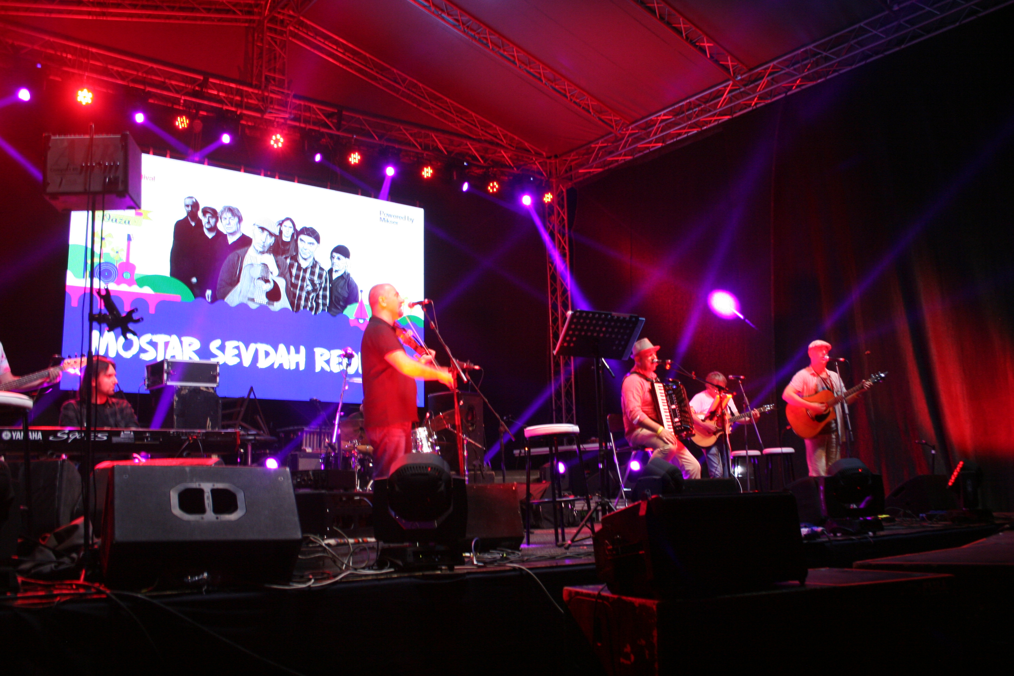 Koncert Mostar sevdah reunion, Šabački letnji festival 2017.